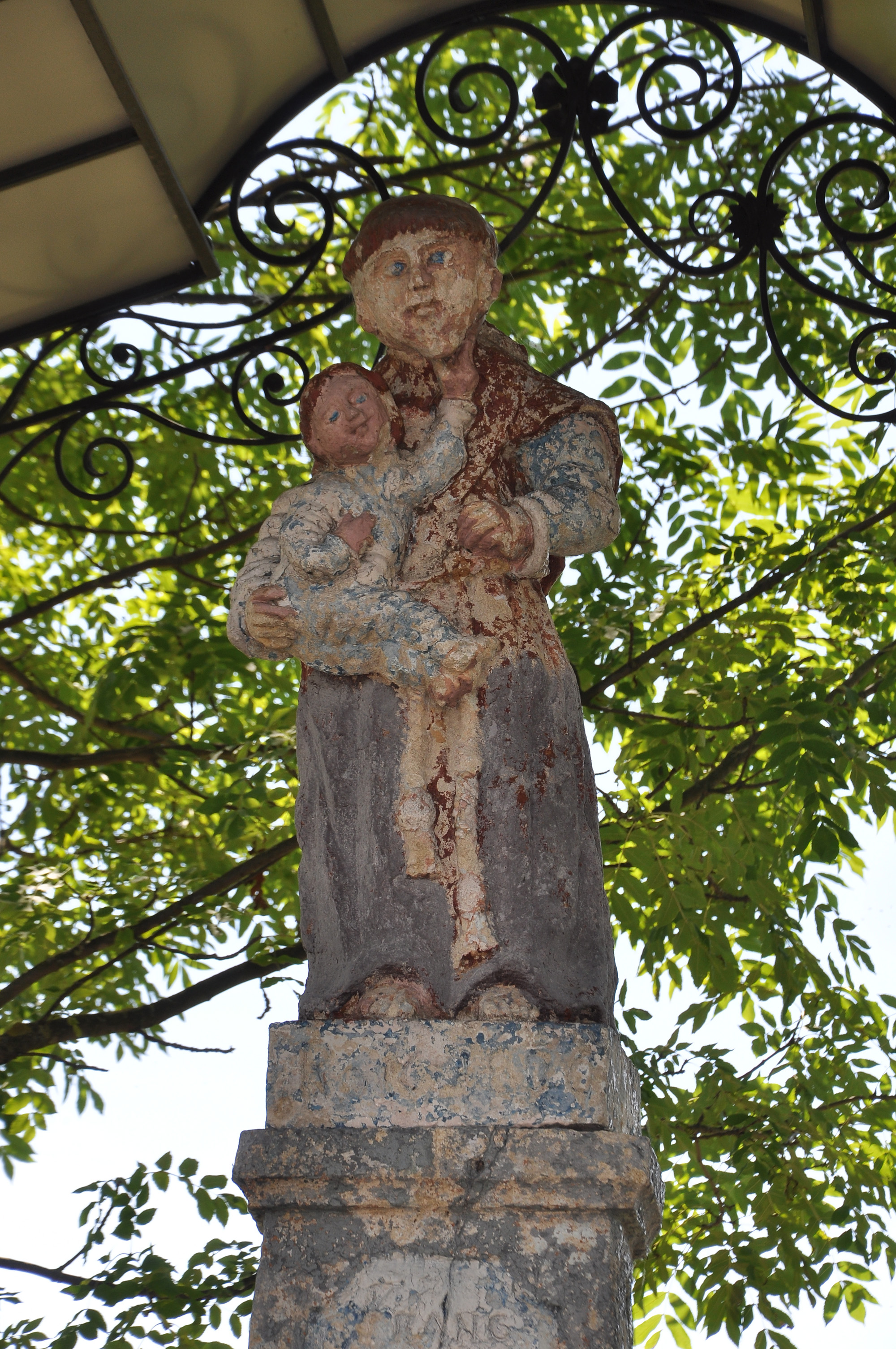 Пам'ятник св. Антонію за р. Стрипою на західній околиці села Підзамочок Бучацького району Тернопільської області.